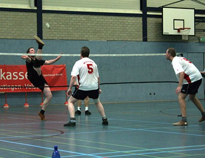 Federfussball Doppelturnier Hilden 2006_Bild Nr 6